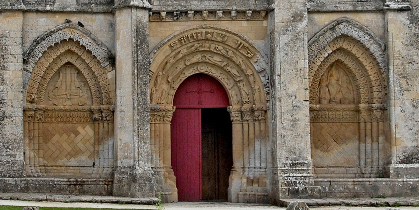 St.-Pierre Aulnay, Archivoltenportale Fassade